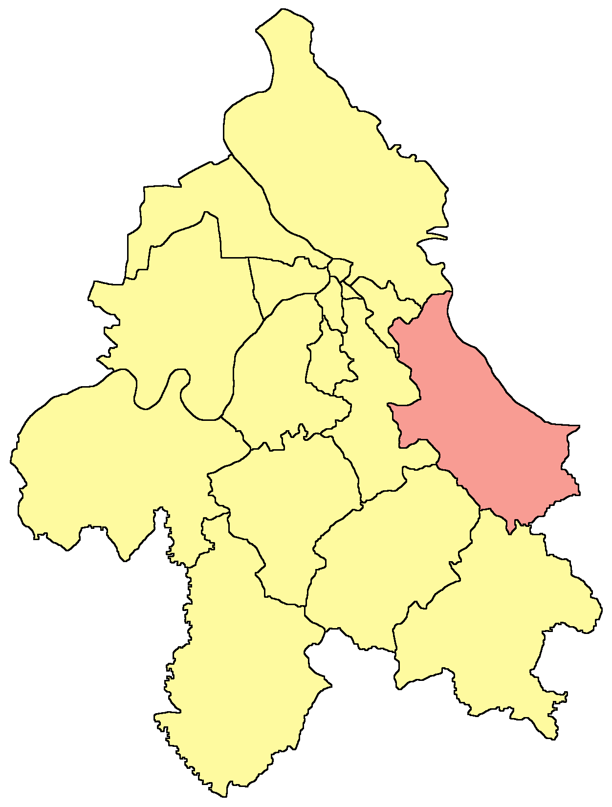 Belgrade municipality map